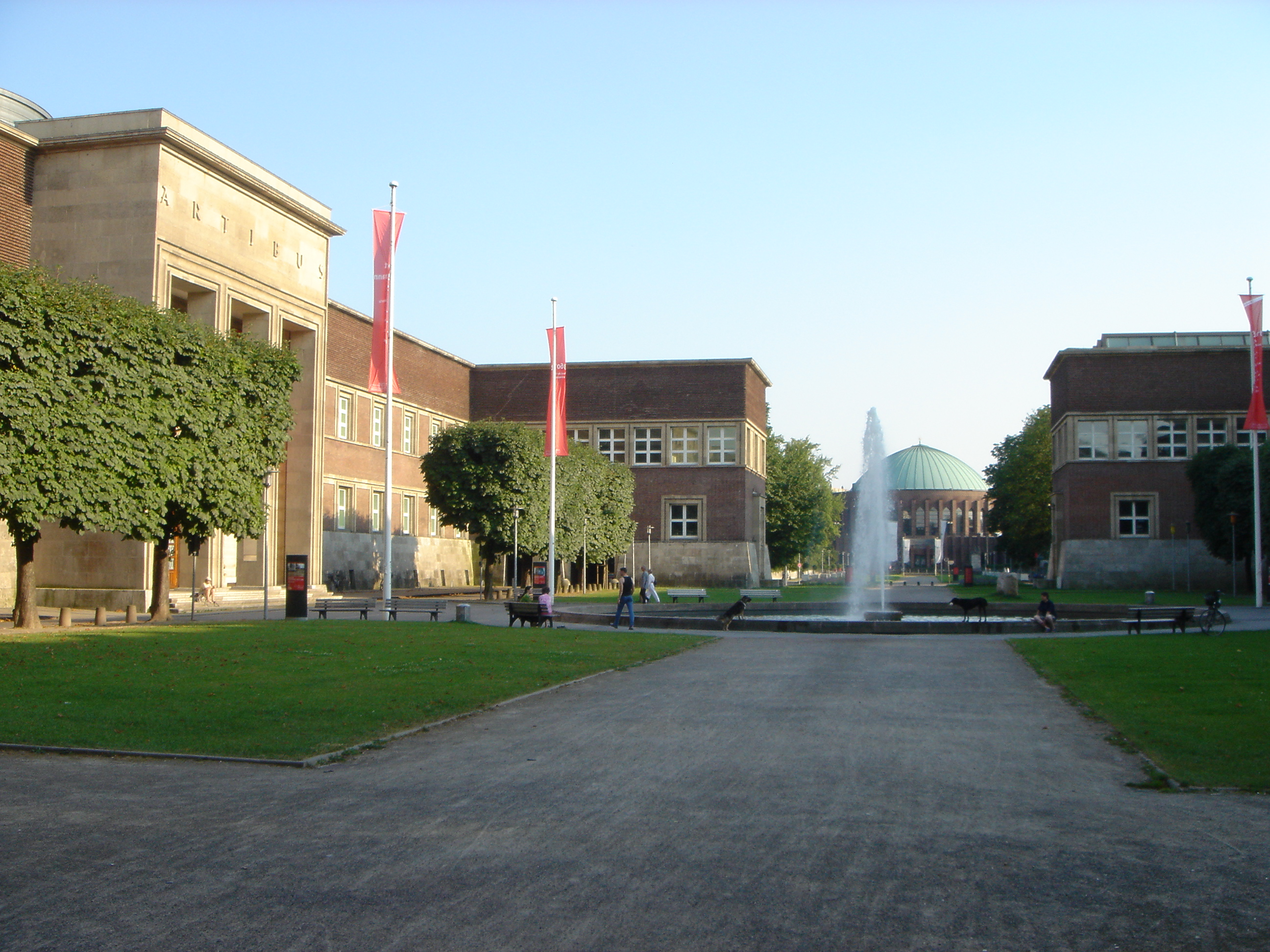 Pempelfort Ehrenhof, selbst fotografiert, gemeinfrei